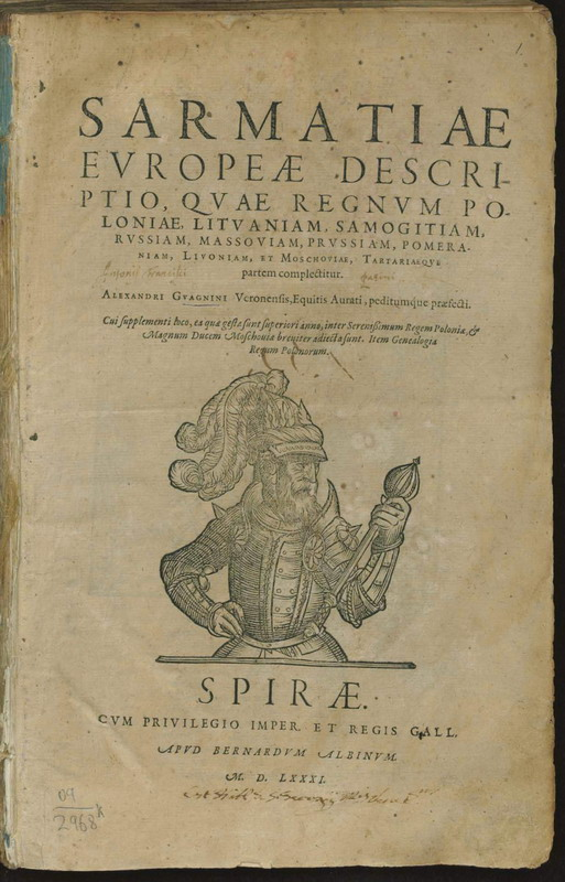 Тытульны аркуш Sarmatiae europeae descriptio (Апісанне Еўрапейскай Сарматыі). Шпаер. 1581